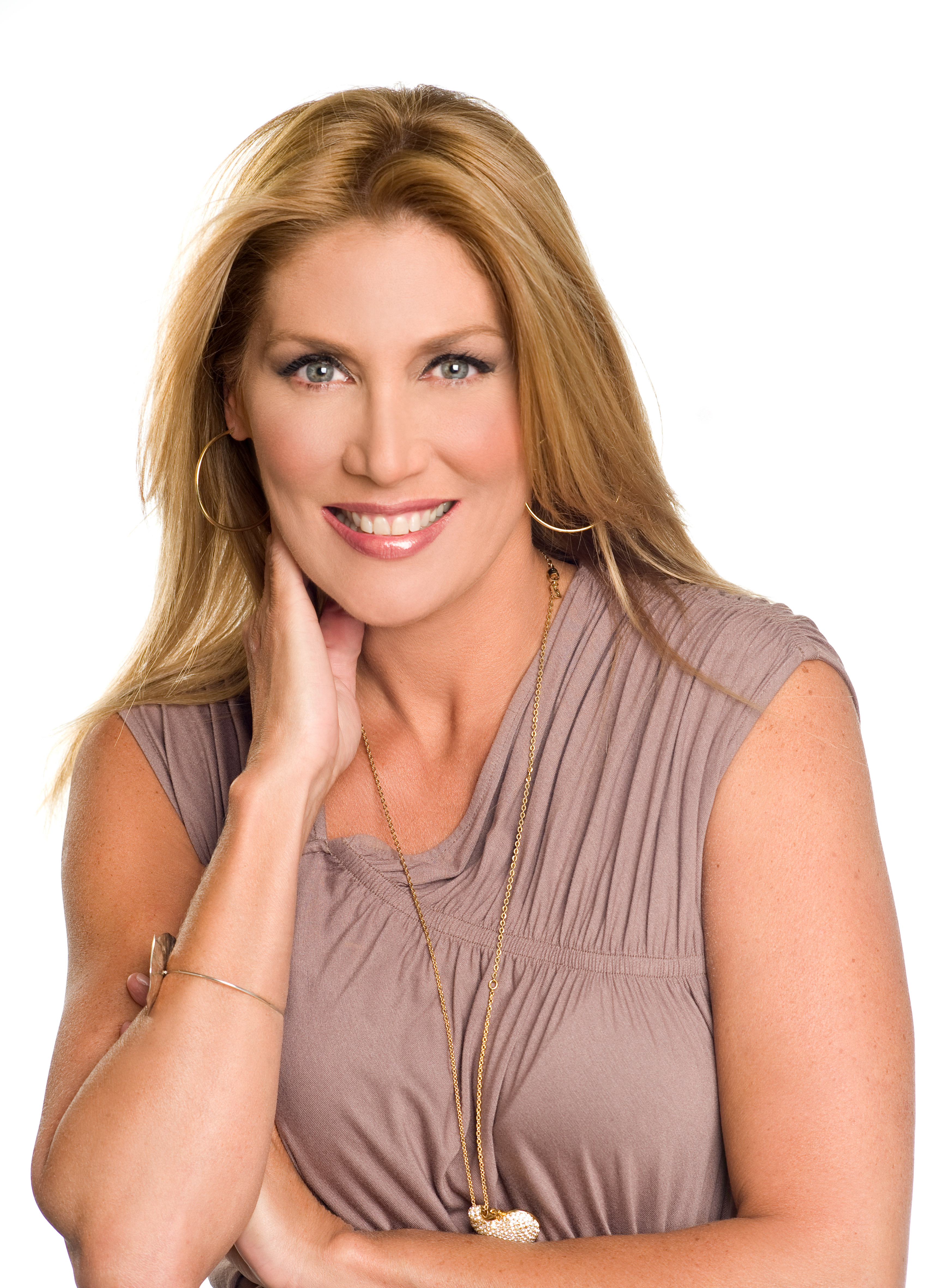 Maite Delgado.